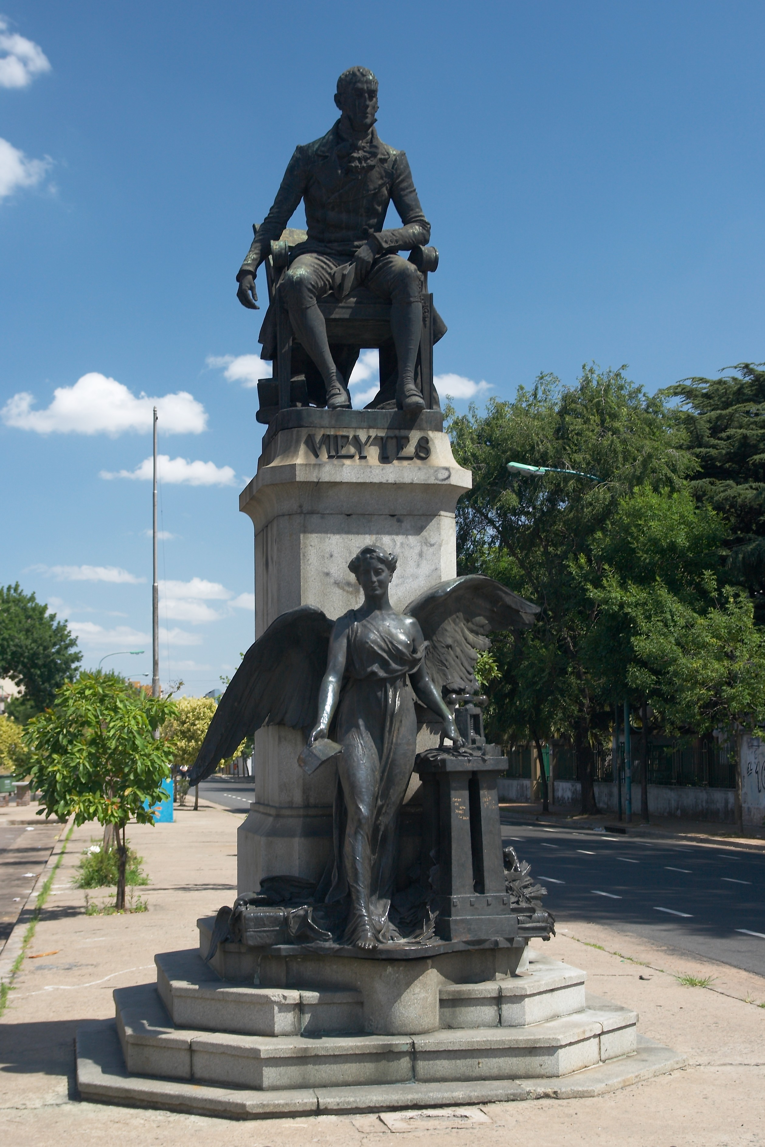 Monumento a Vieytes, en la avenida homónima, barrio de Barracas, Buenos Aires, Argentina. Obra del escultor español José Llaneces.